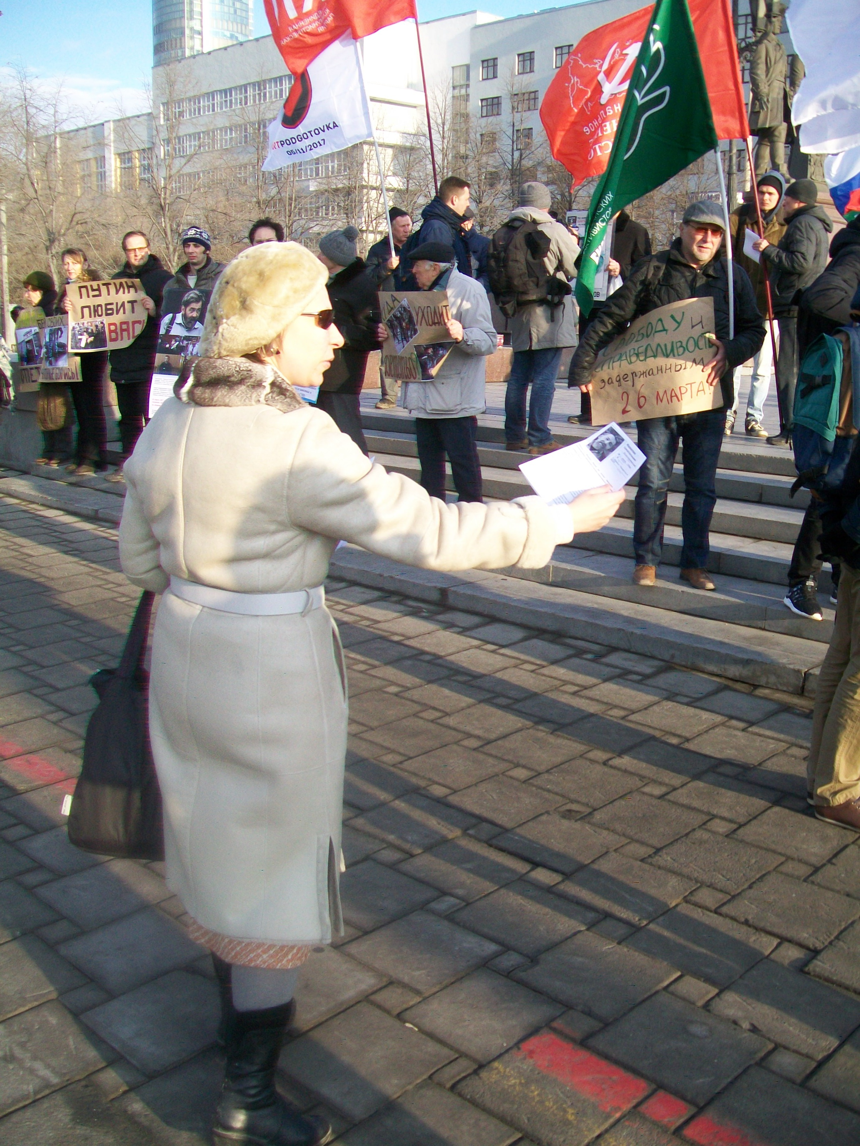 Женщина раздает листовку, посвященную Сергею Мохнаткину. Пикет в защиту политзаключенных, Екатеринбург, 6 апреля 2017 года